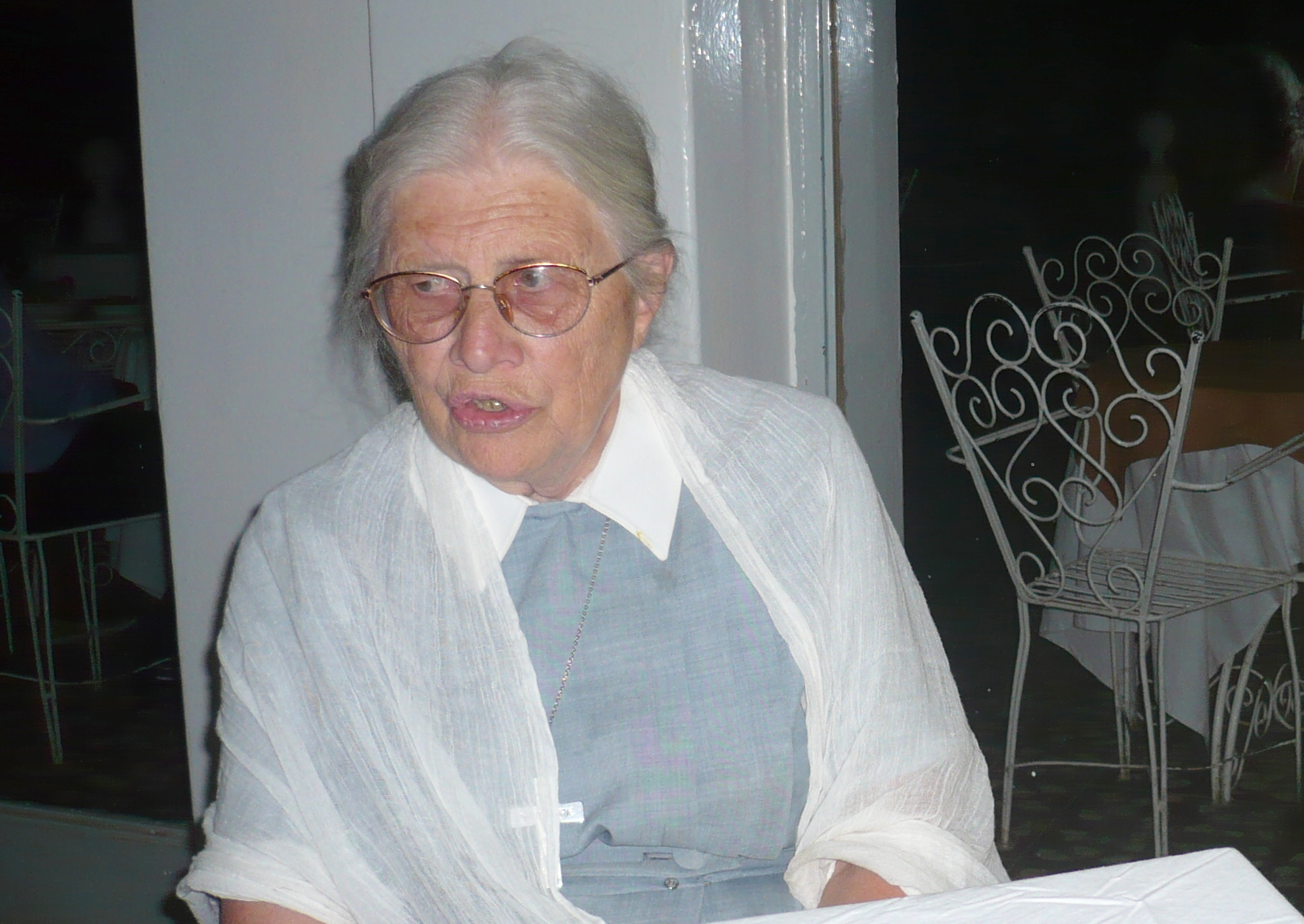 Fotografie von Annemarie Weseloh in Äthiopien